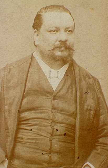 Edmond Goupil (1838-1919)